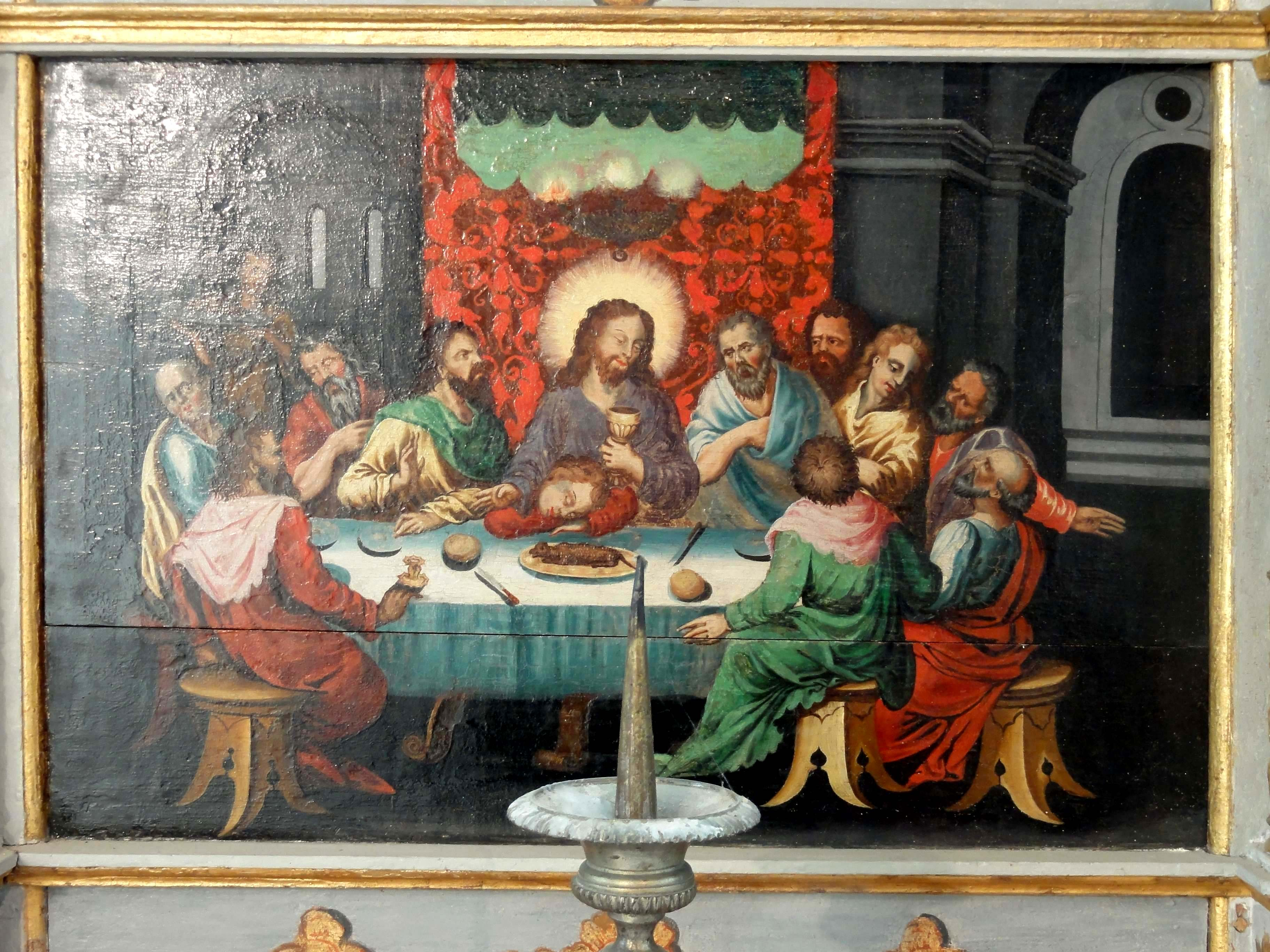 Mobilier de l'église Saint-Sulpice de Béthancourt-en-Valois - voir titre.